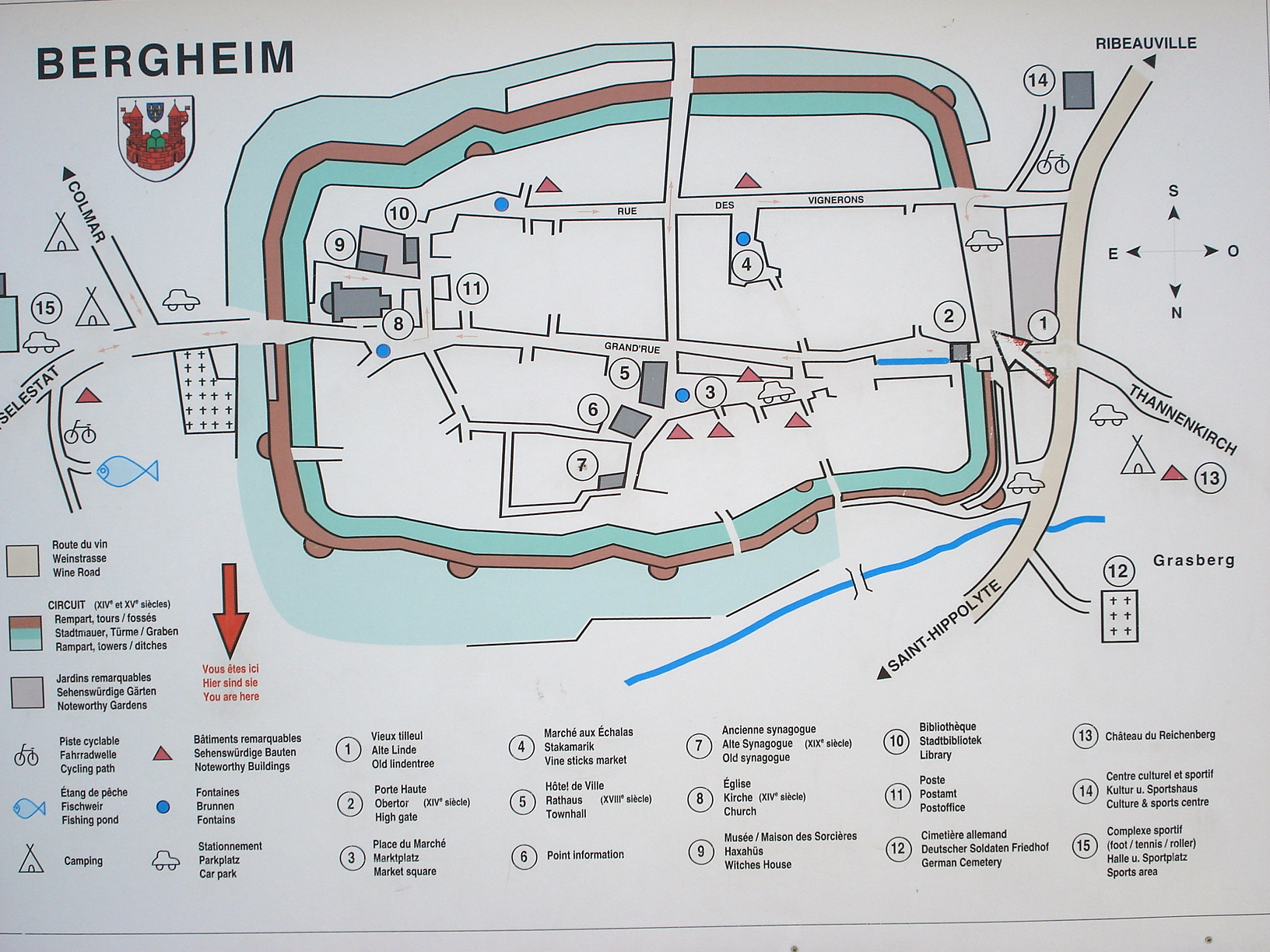 Bergheim (dép. Haut-Rhin, France). Plan de ville apposé par la municipalité à l'entrée de la ville près de la Porte Haute.